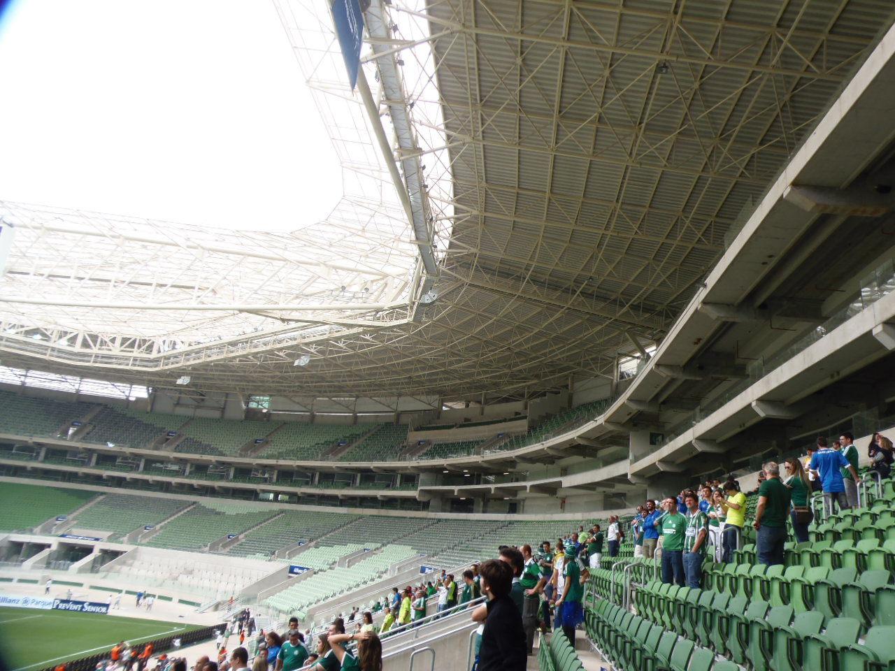 Allianz Parque - Detalhe da Cobertura